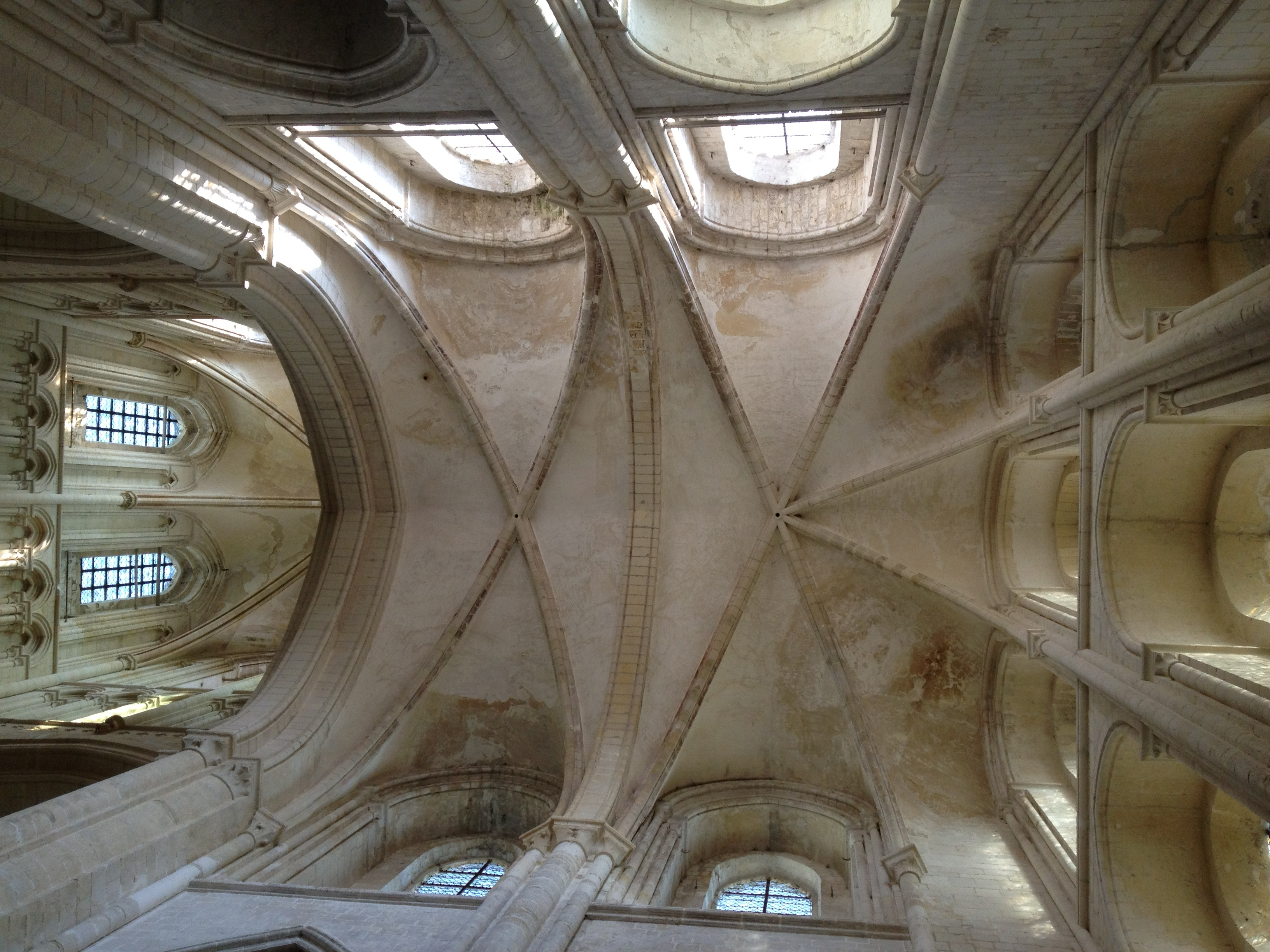 Voûtes gothique du transept sud.